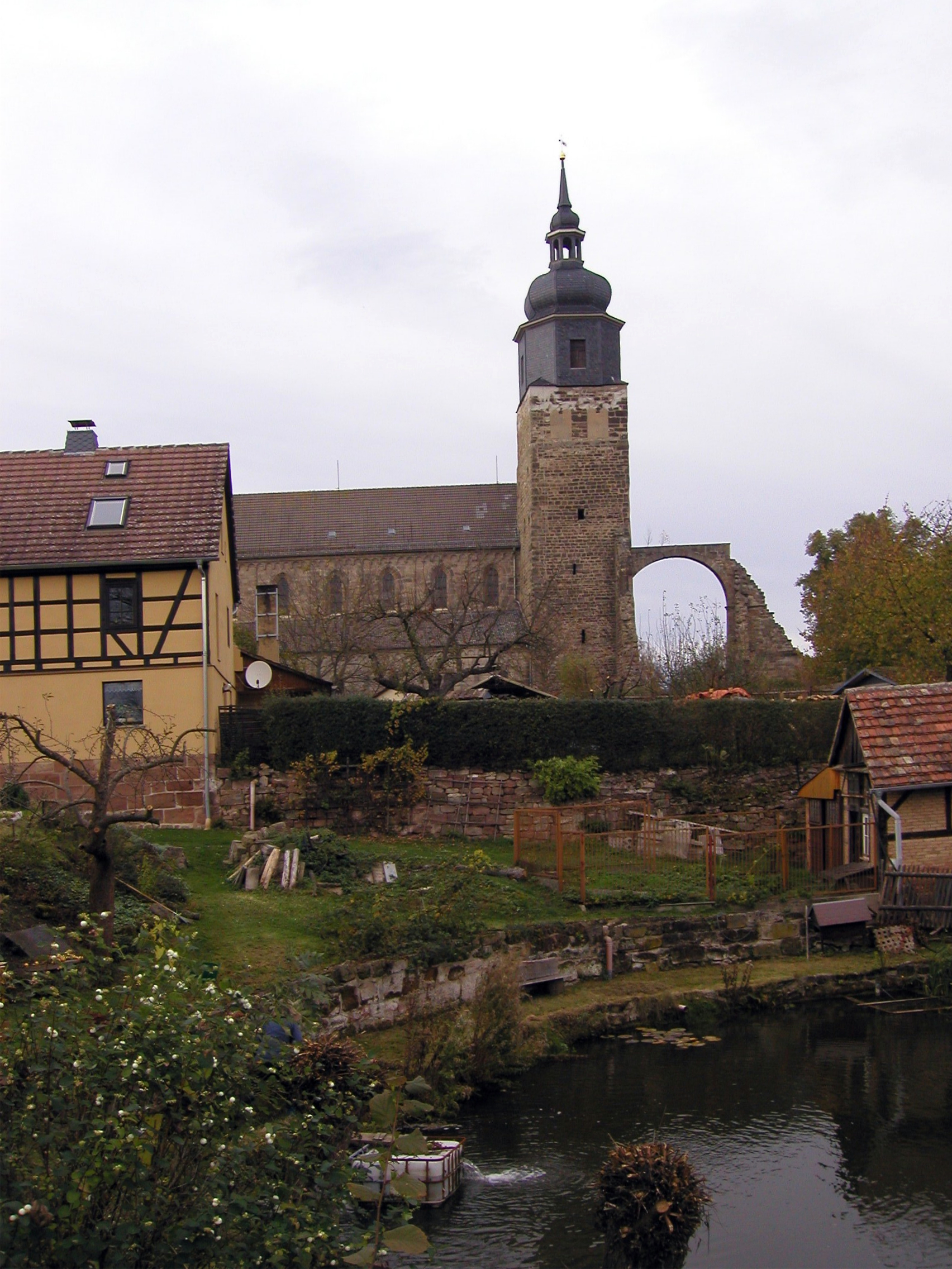 Reste des Vierungsbogens der Klosterkirche Thalbürgel